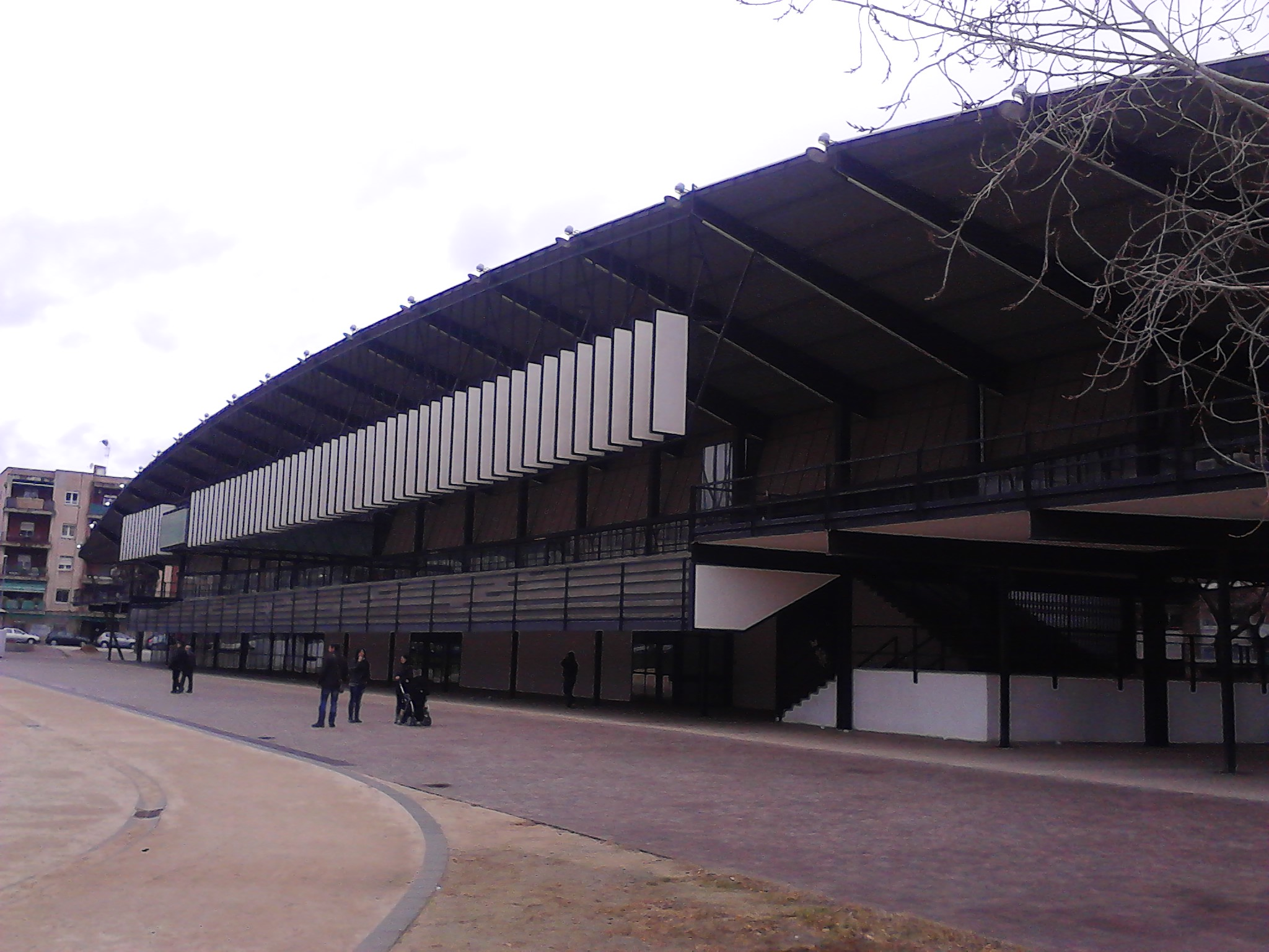 Canòdrom Meridiana (Barcelona)